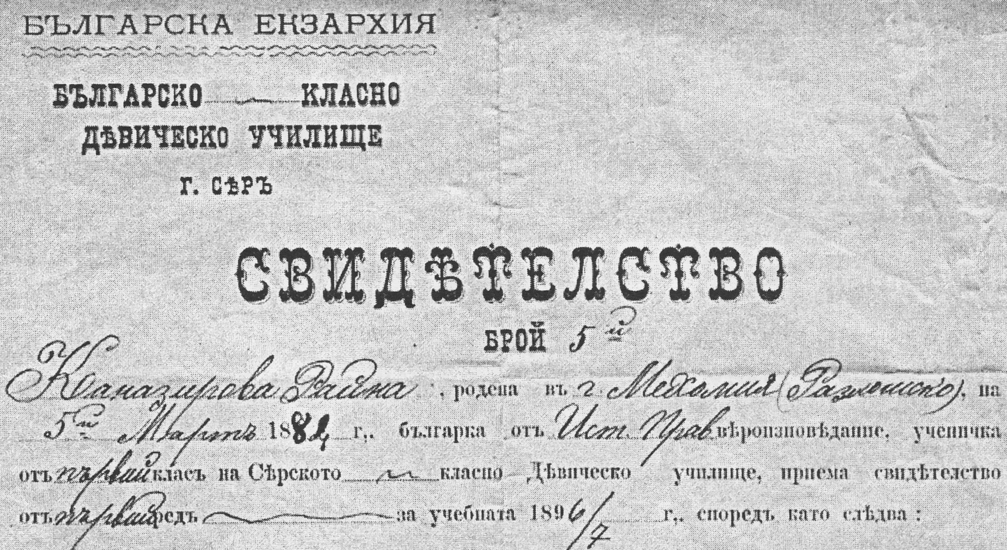 Свидетелство за завършен курс, издадено от българското девическо училище в Сяр.